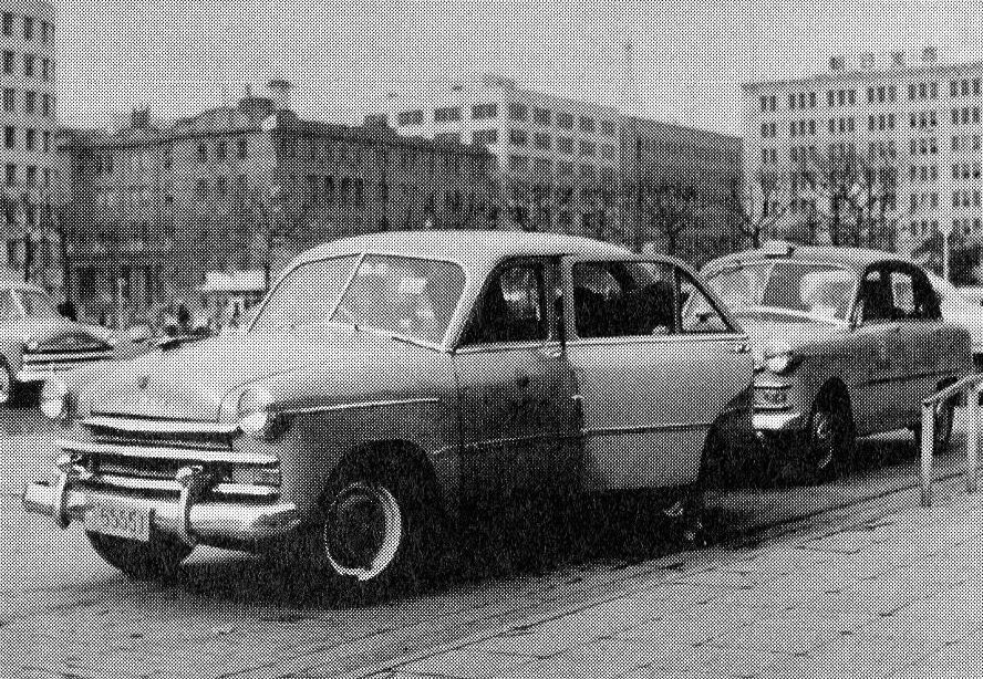 プリンス・セダンAISH-I型タクシー。